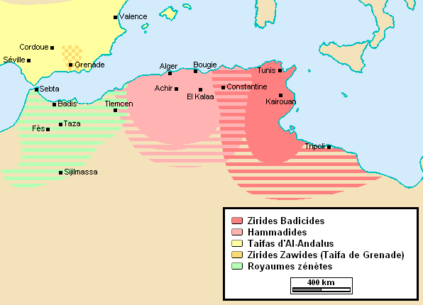 Le territoire ziride après la sécession des Hammadides et l'établissement de l'Emirat zawide de Grenade